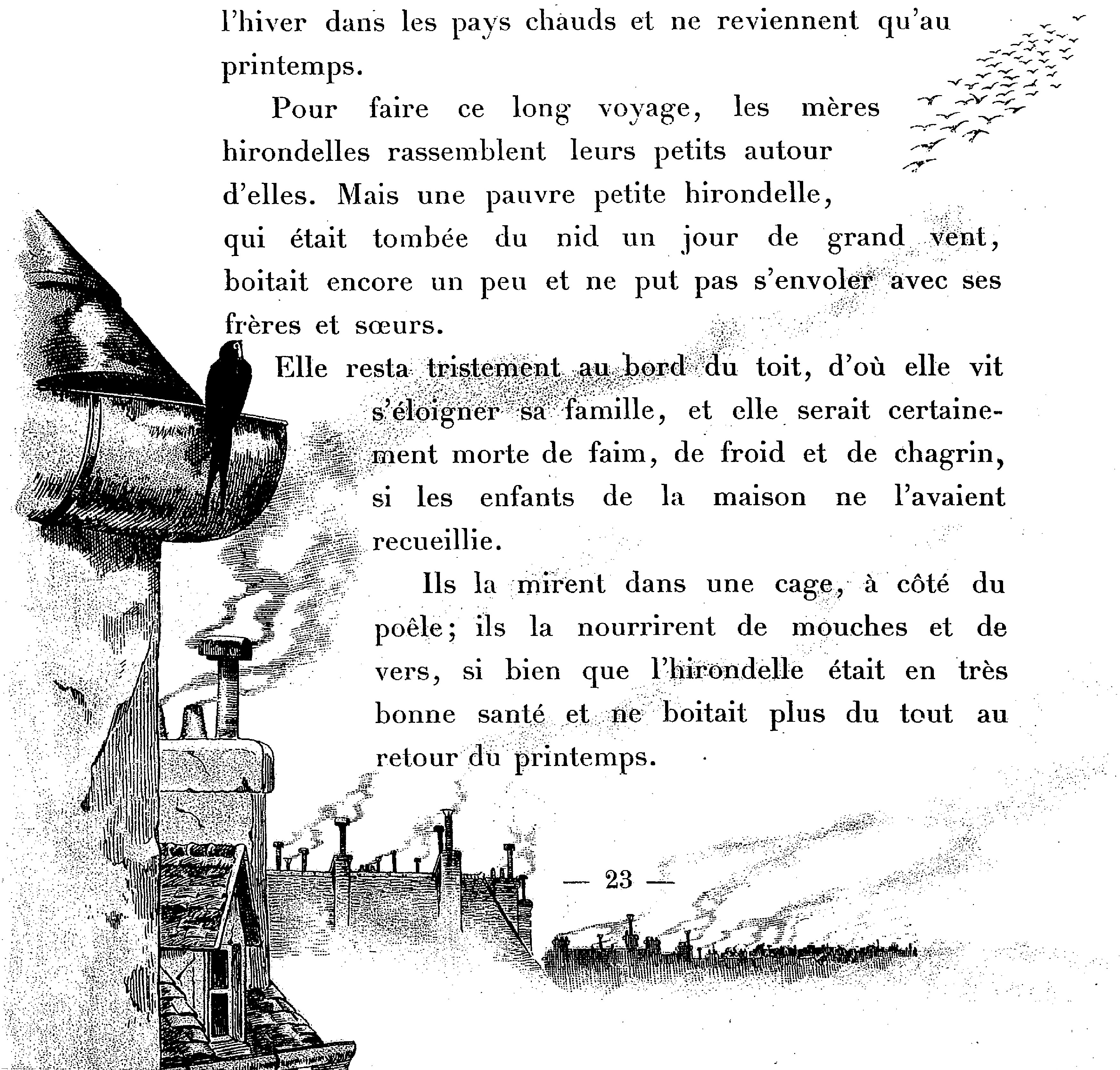 Livre pour Wikisource